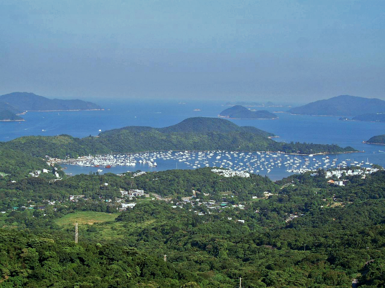 中文（香港）: 西貢白沙灣